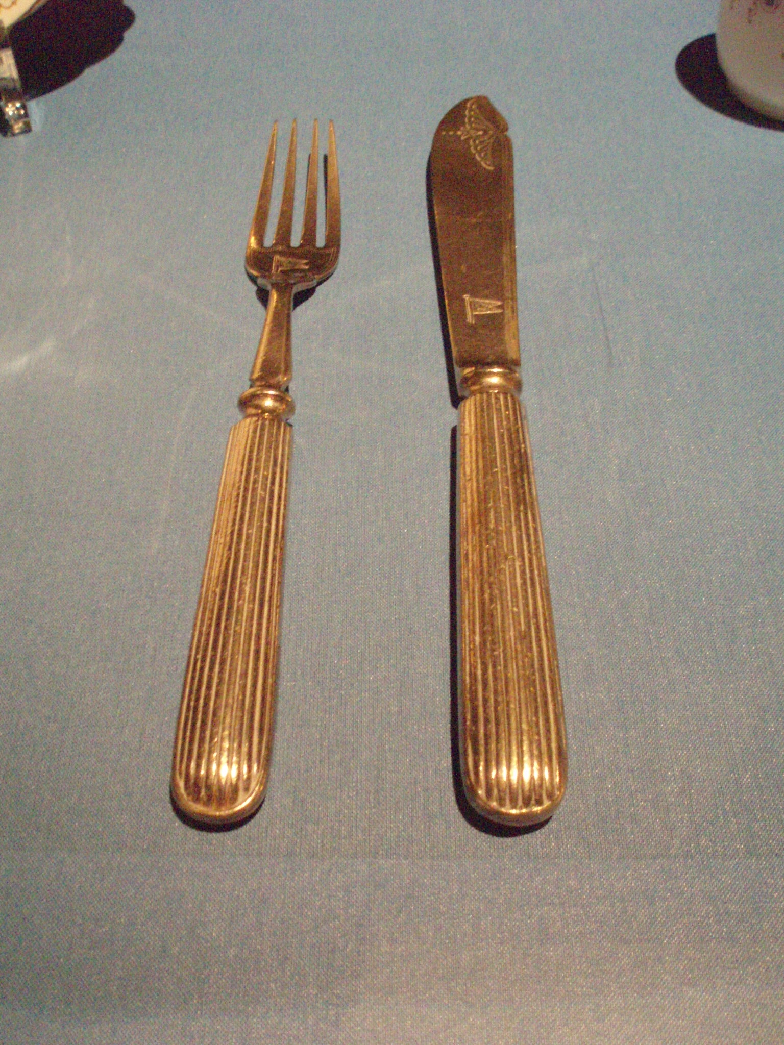 eigen foto (c) looi Bestek gebruikt op de RMS Titanic. Parque de las Ciencias in Granada (Spain)